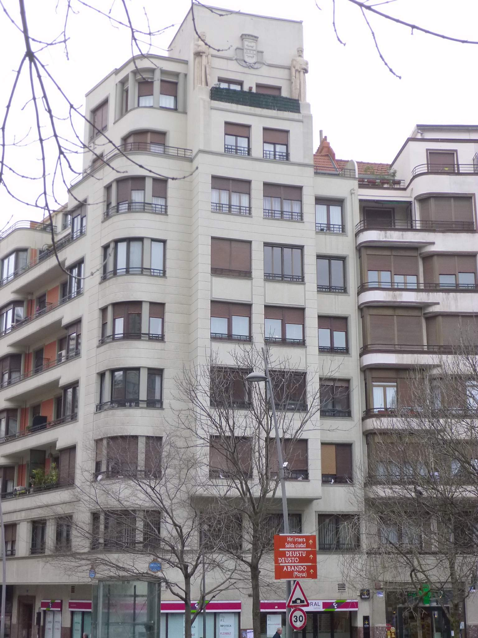 Edificio en Plaza de Zabálburu 4 (Bilbao)